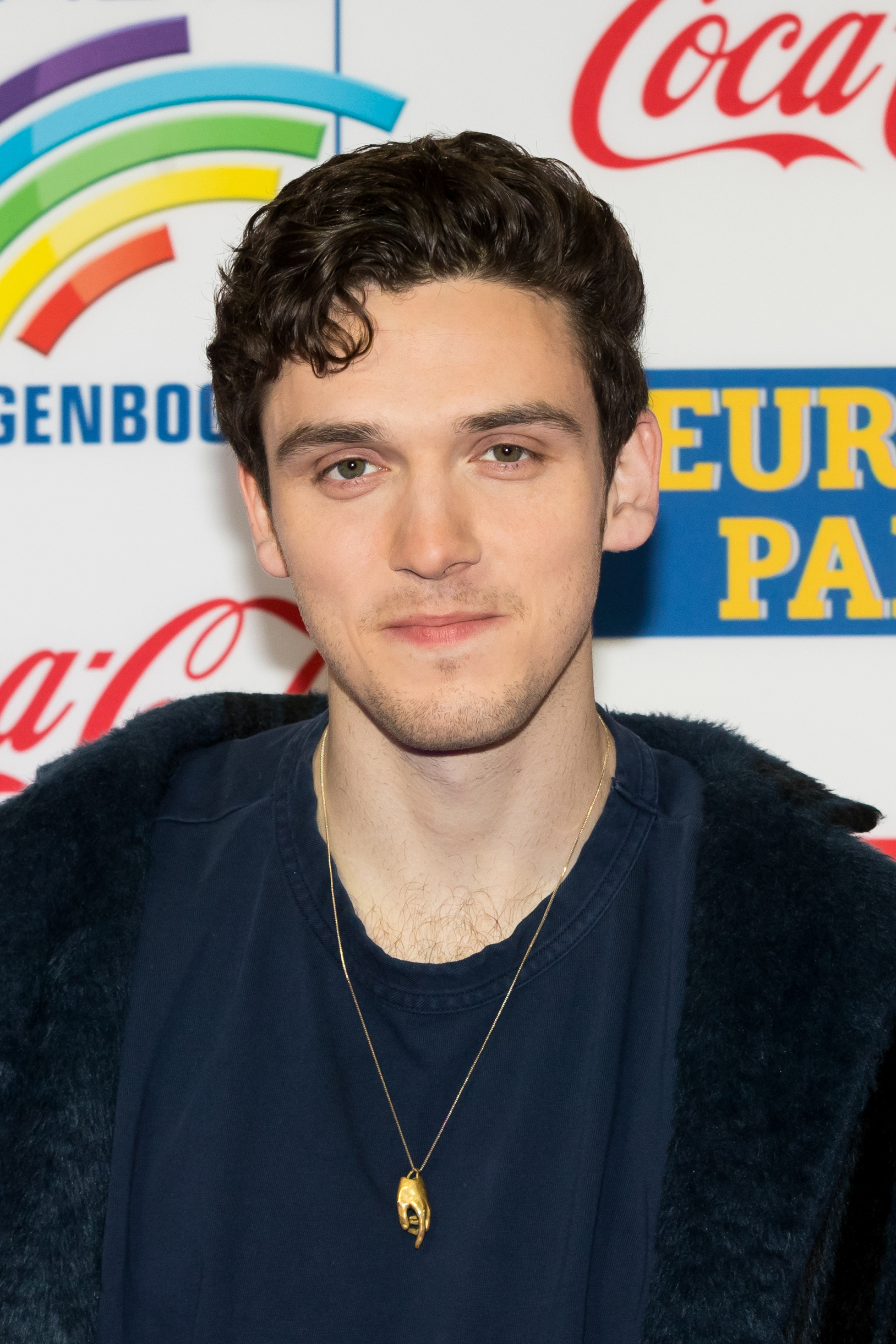 during Radio Regenbogen Award 2018 at Europapark, Rust, Baden-Württemberg, Germany on 2018-03-23, Photo: Sven Mandel